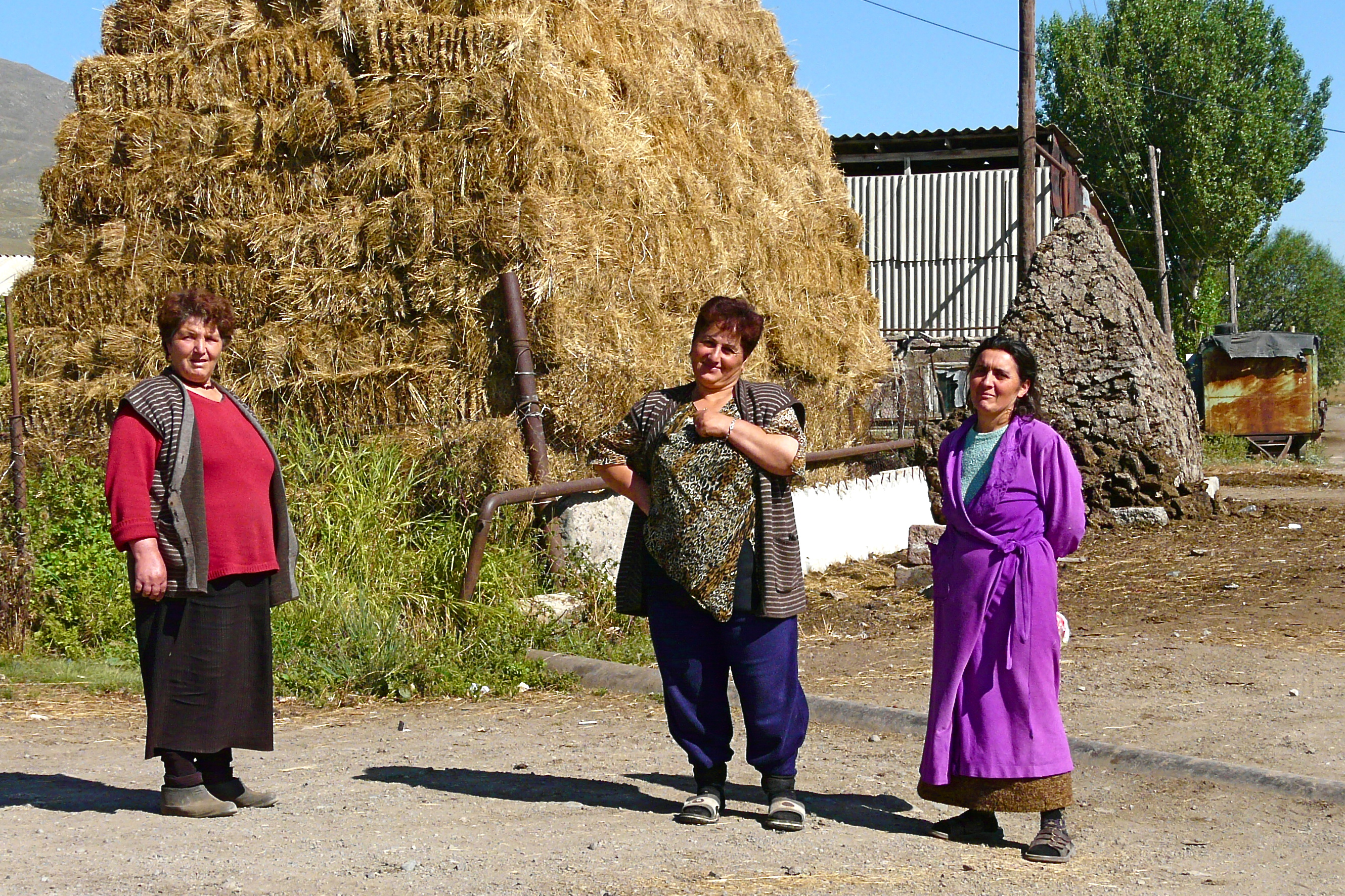 Gor Ayk. Dorpje in zuidelijk Armenië.